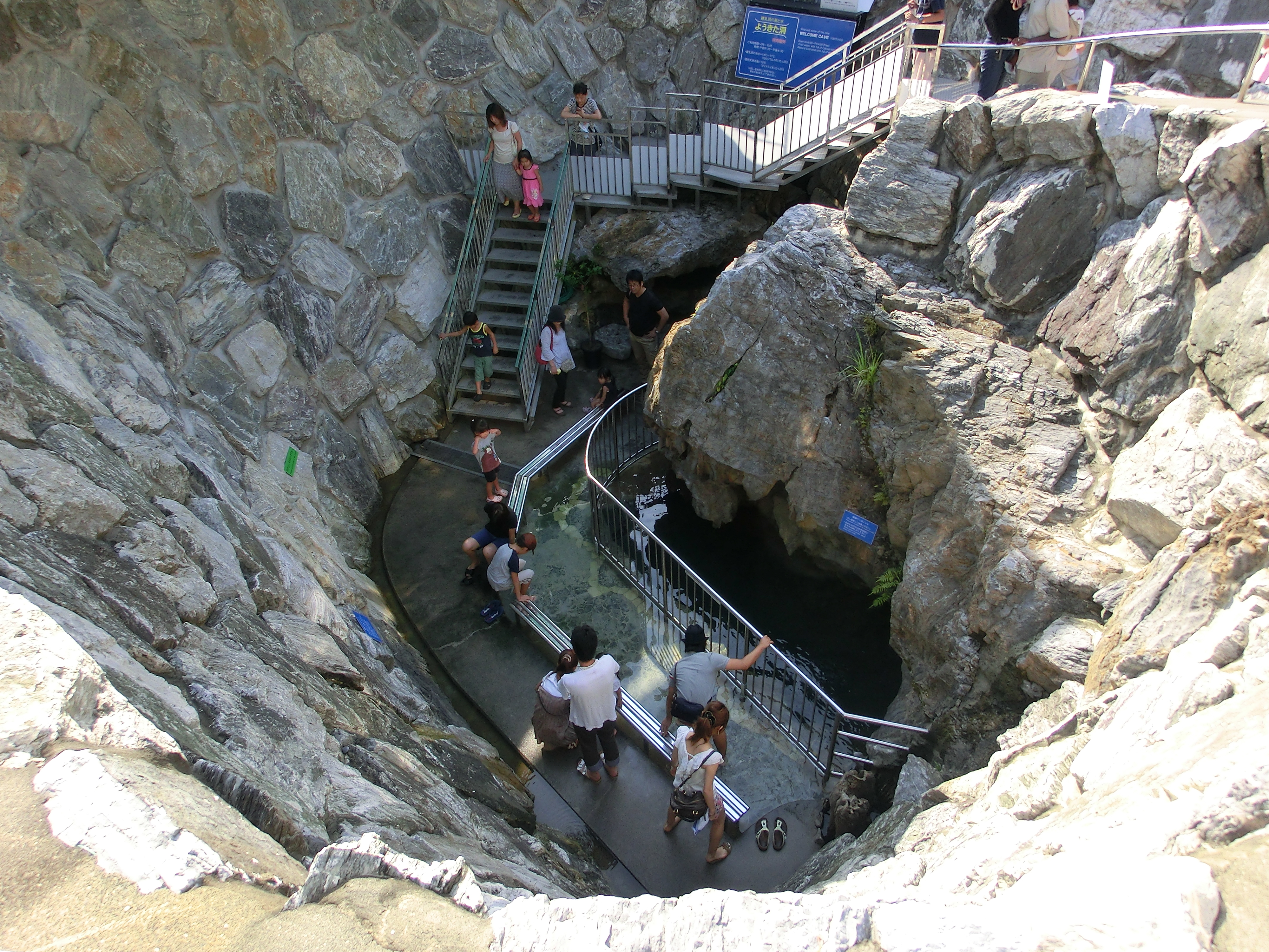 Inasacho Tabatake, Kita Ward, Hamamatsu, Shizuoka Prefecture 431-2221, Japan